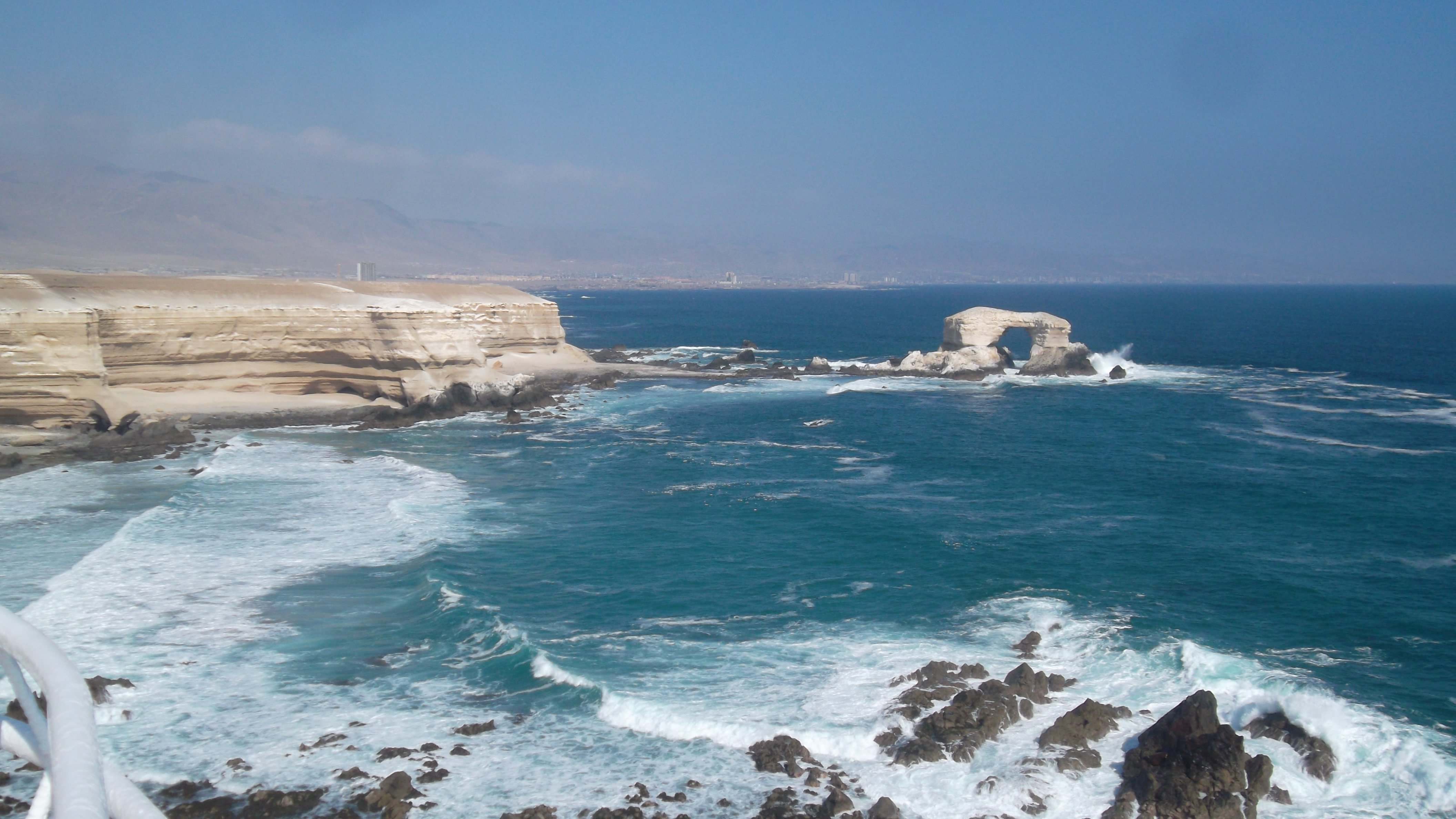 ANTOFAGASTA - LA PORTADA